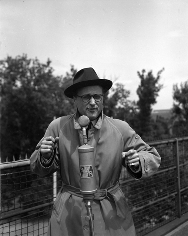 Heribert Meisel kommentiert eine Sportveranstaltung für den Sender Rot-Weiß-Rot.